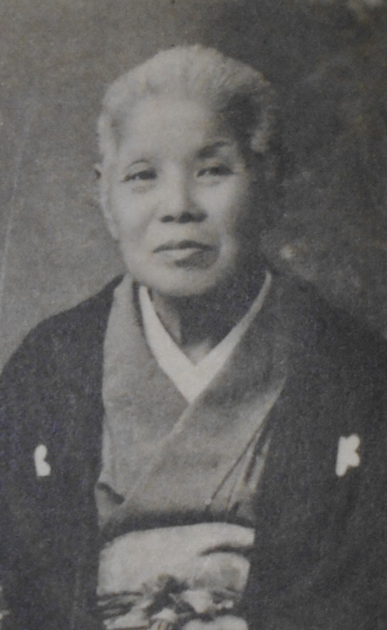 芳野菅子著・島崎圭一編『芳野菅子歌集』1931年に収載。